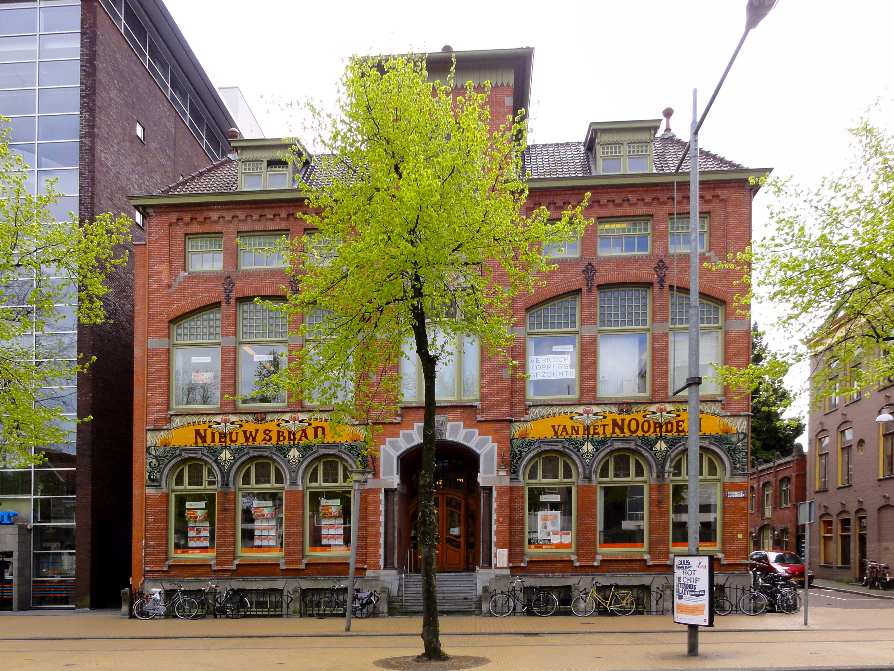 Gedempte Zuiderdiep 24 - voormalig pand Nieuwsblad van het Noorden - te Groningen